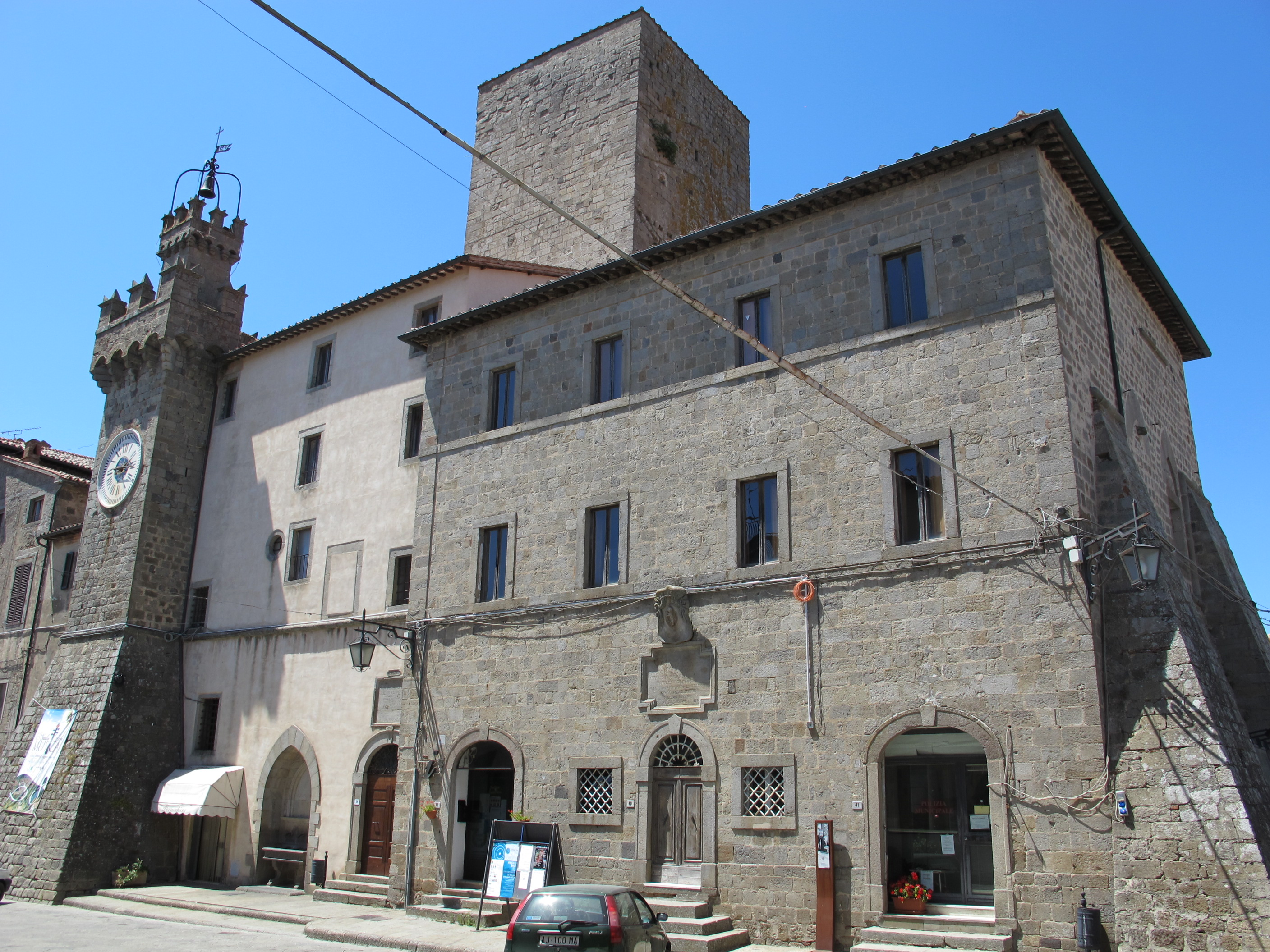 Santa fiora, rocca aldobrandesca